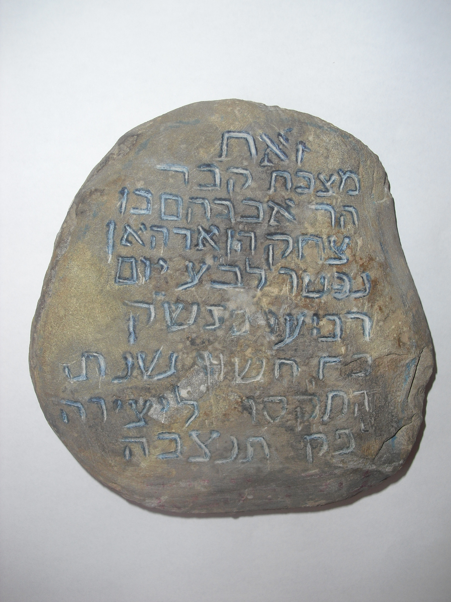 juifs